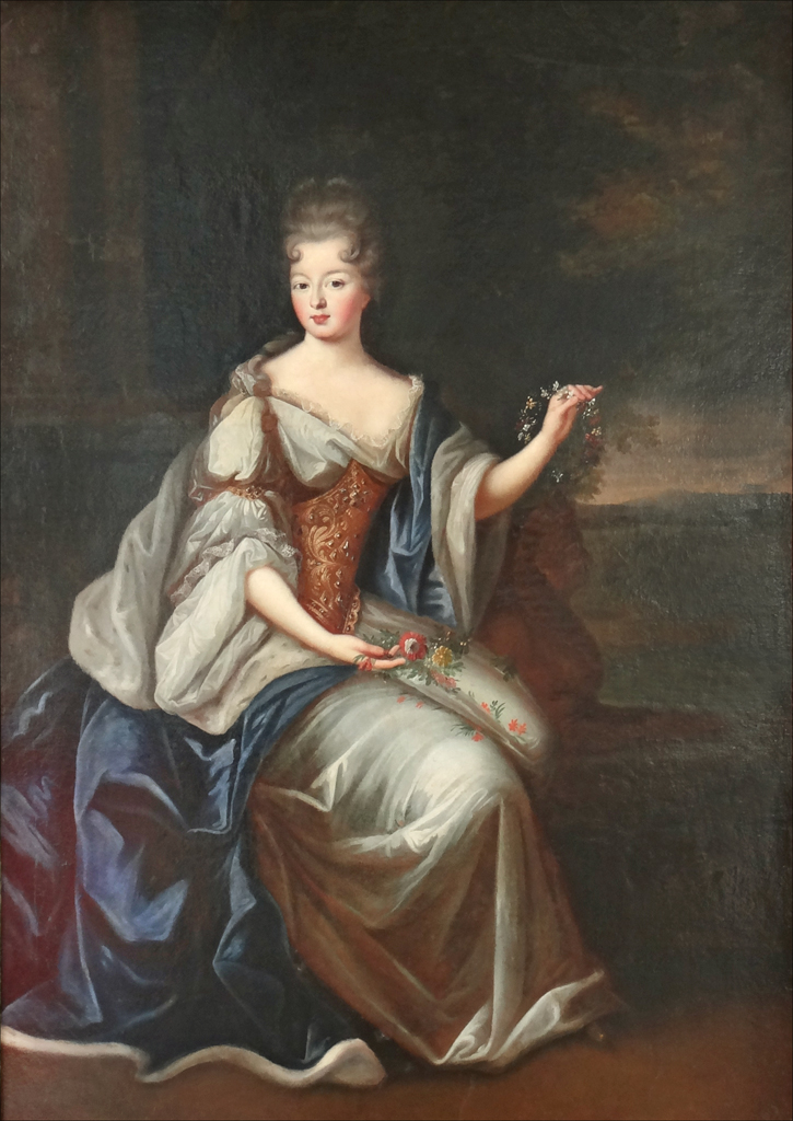 Louise-Bénédicte de Bourbon (1676-1753), Duchesse du Maine, épouse du Duc du Maine, bâtard légitimé de Louis XIV et de Madame de Montespan, tenait une cour dans son château de Sceaux, donnait des fêtes et accueillait des écrivains (notamment Voltaire), des artistes et des savants (Fontenelle, de Malézieu) . Les seize grandes nuits de Sceaux qui se sont déroulées entre avril 1714 et mai 1715, sont les plus célèbres mais d'autres eurent lieu en 1722, de 1729 à 1733, 1748, 1750 Le château de Sceaux a été acquis par le Duc du Maine, en 1700, aux héritiers du fils de Colbert : le marquis de Seignelay. Musée de l'île-de-France